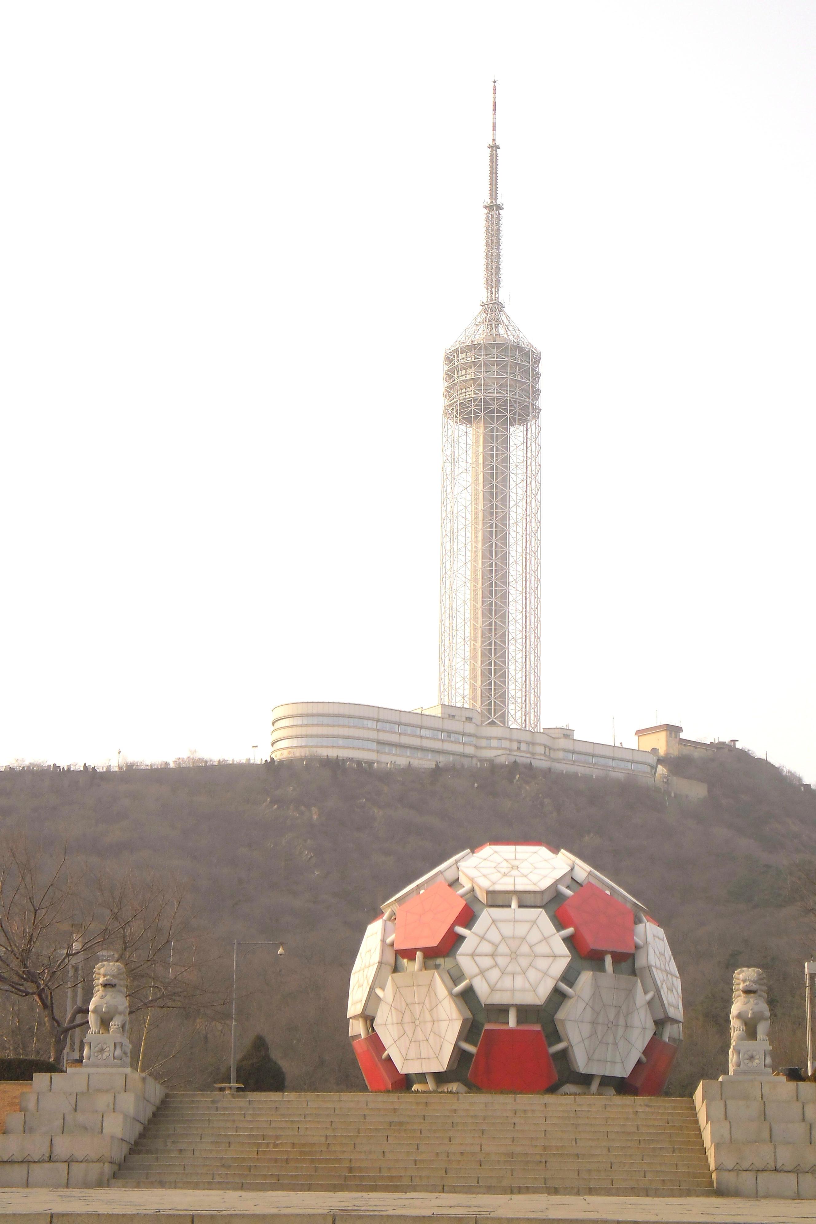 中文（中国大陆）: 辽宁省大连市